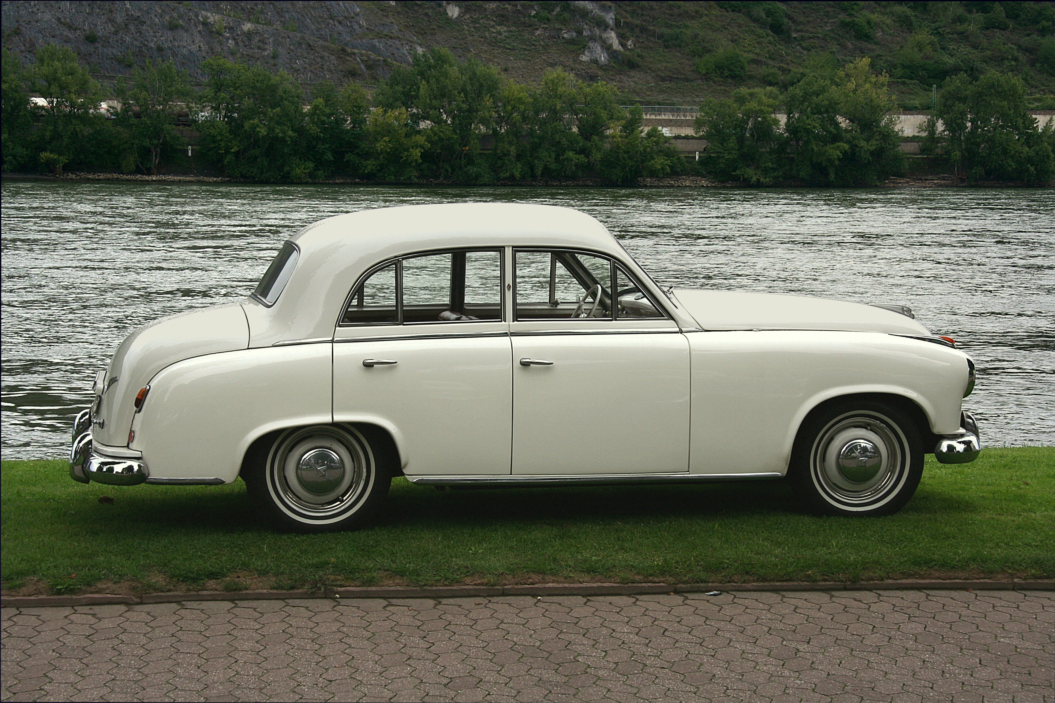 Bildbeschreibung: Borgward Hansa 1800 (Bauzeit 1952 bis 1954) - Seitenansicht Fotograf: Lothar Spurzem Datum: 08.09.2007 beim Borgwardtreffen in Andernach Sonstiges: Kennzeichen und nicht originale Blinkleuchten am Heck retuschiert